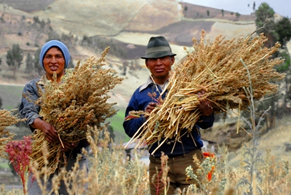 Fairtrade Certified quinoa producers in Ecuador